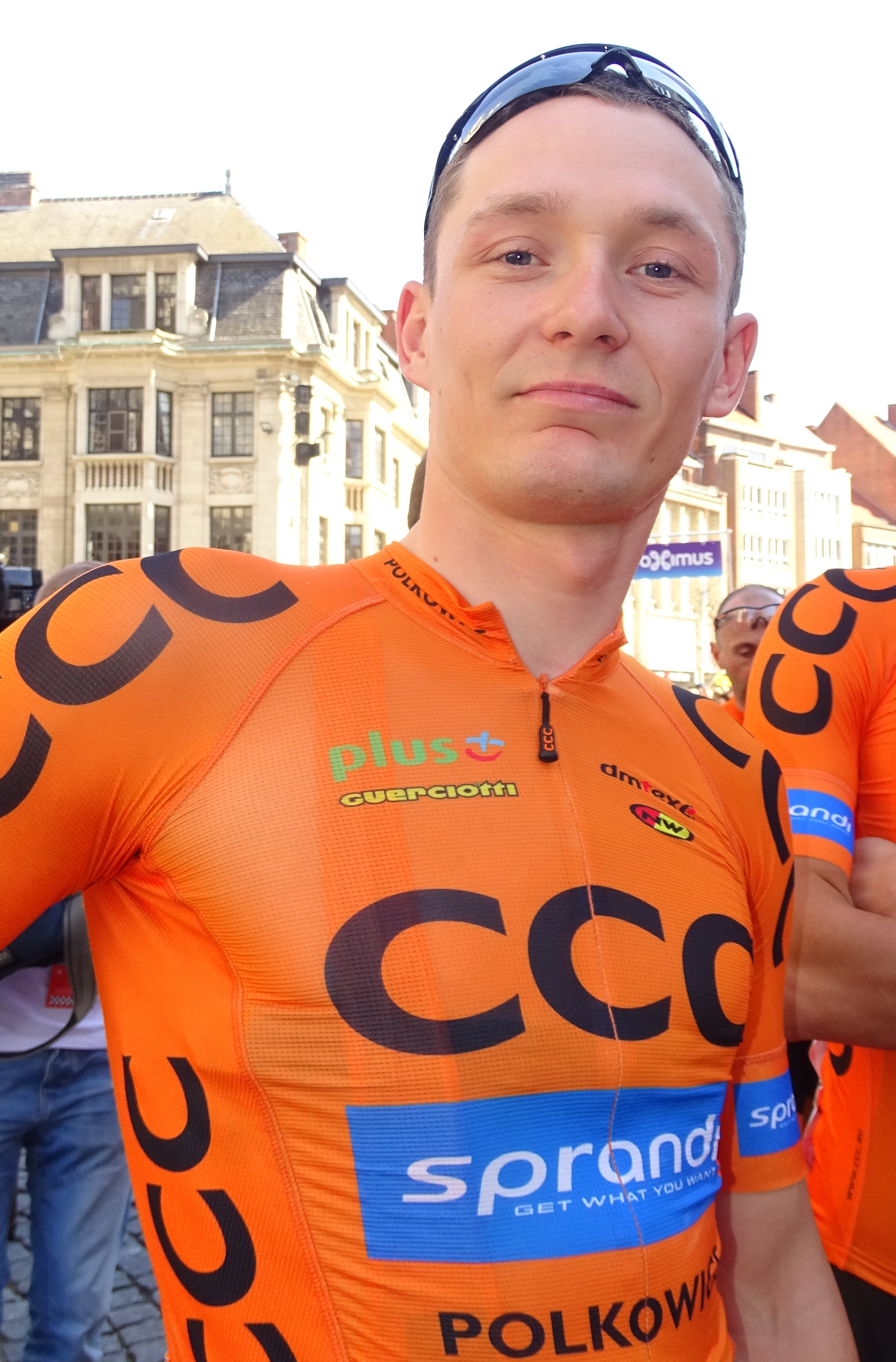 Reportage réalisé le mercredi 15 avril à l'occasion du départ de la Flèche brabançonne 2015 à Louvain, Belgique.